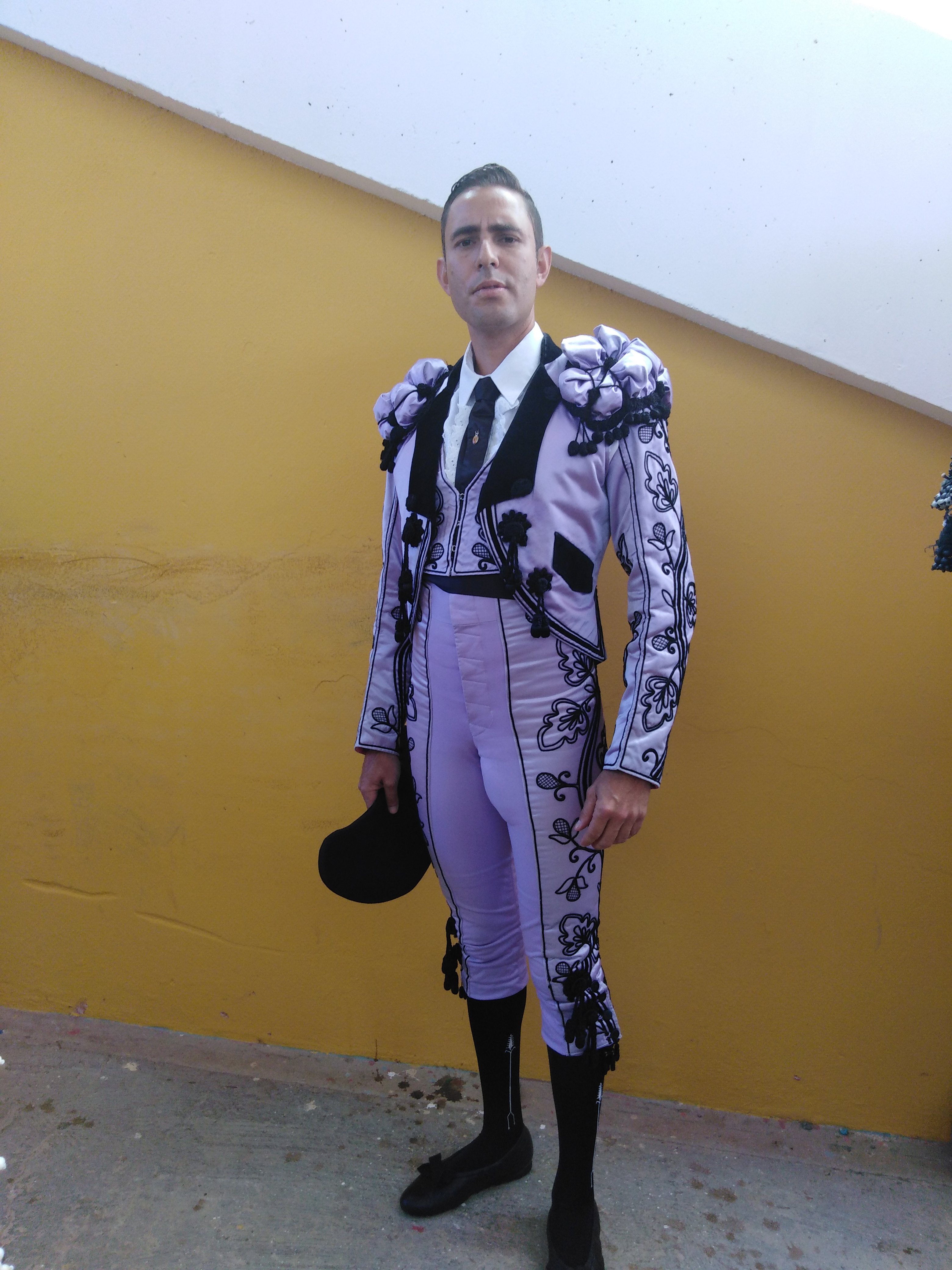 Rafael Orellana vestido en traje goyesco en la segunda corrida de las 175° Feria Internacional de Tovar, Venezuela